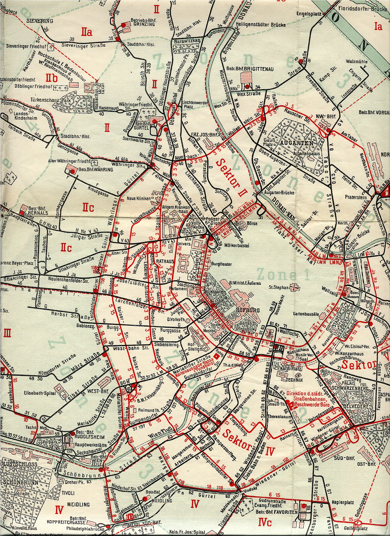 Zelfgefotograafeerde media van een Weense kaart uit 1922 uit mijn eigen collectie